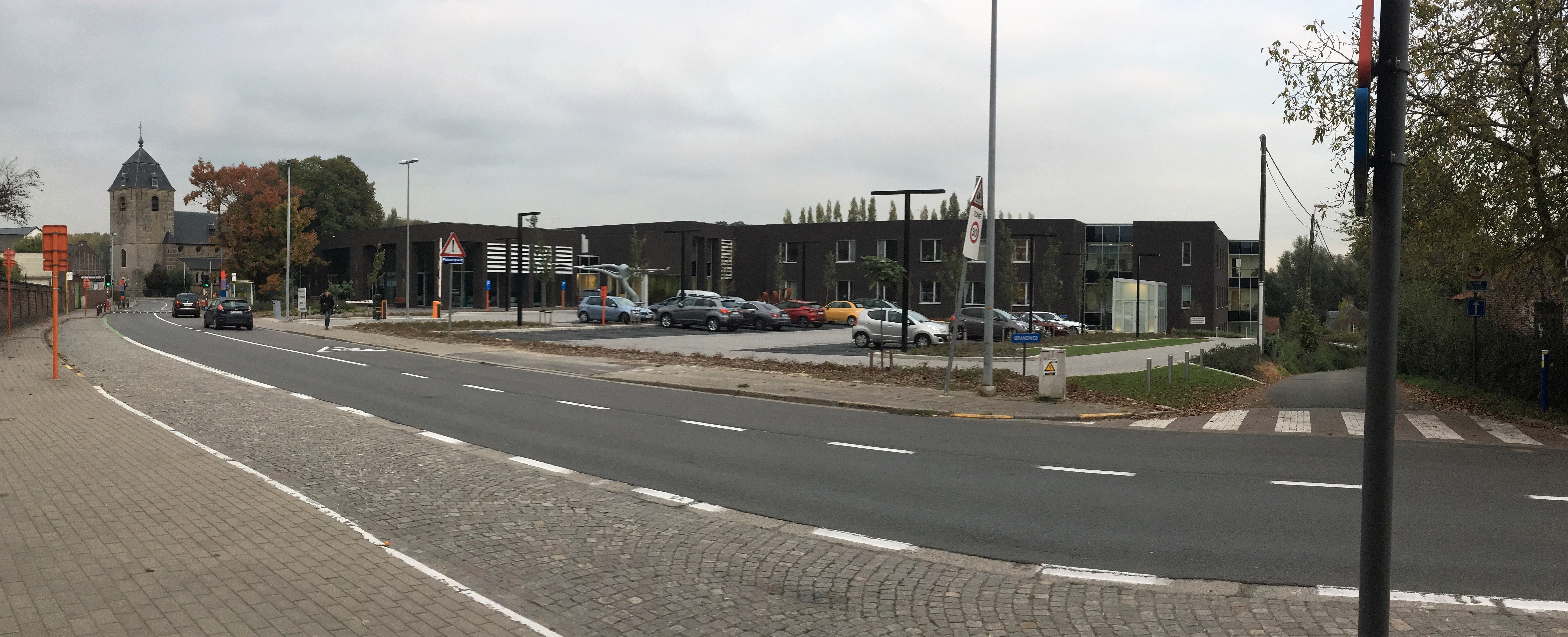 Nieuwbouw woonzorgcentrum "Van Lierde" te Affligem (nieuwbouw voltooid in 2017), met de Sint-Michielskerk op de achtergrond